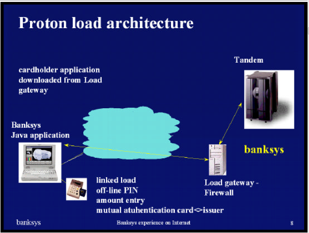 Proton